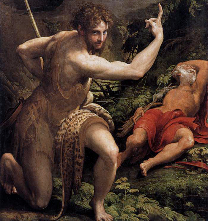 detail